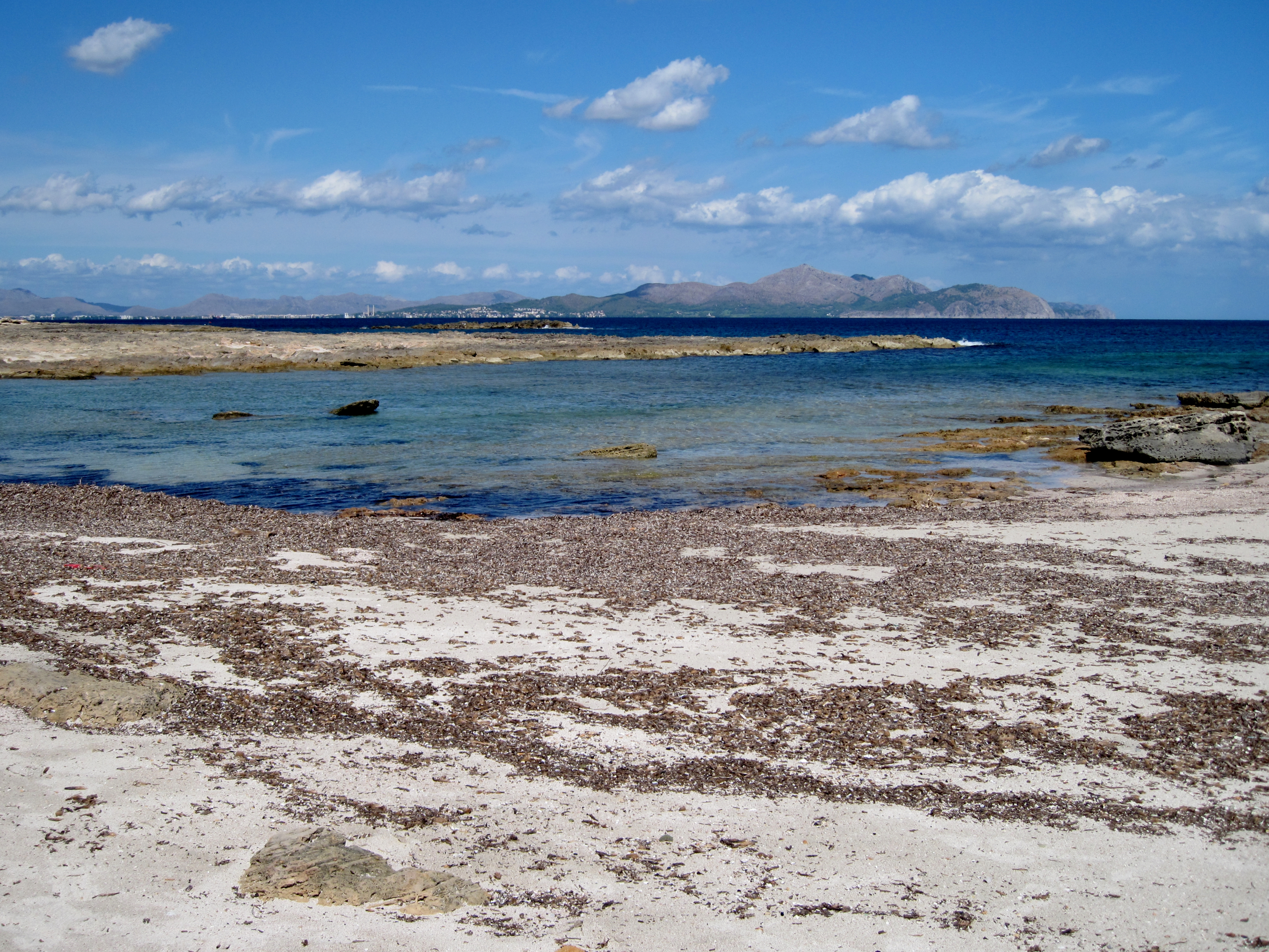 Strand von S’Arenal d’en Casat an der Küste der Gemeinde Santa Margalida, Mallorca, Spanien